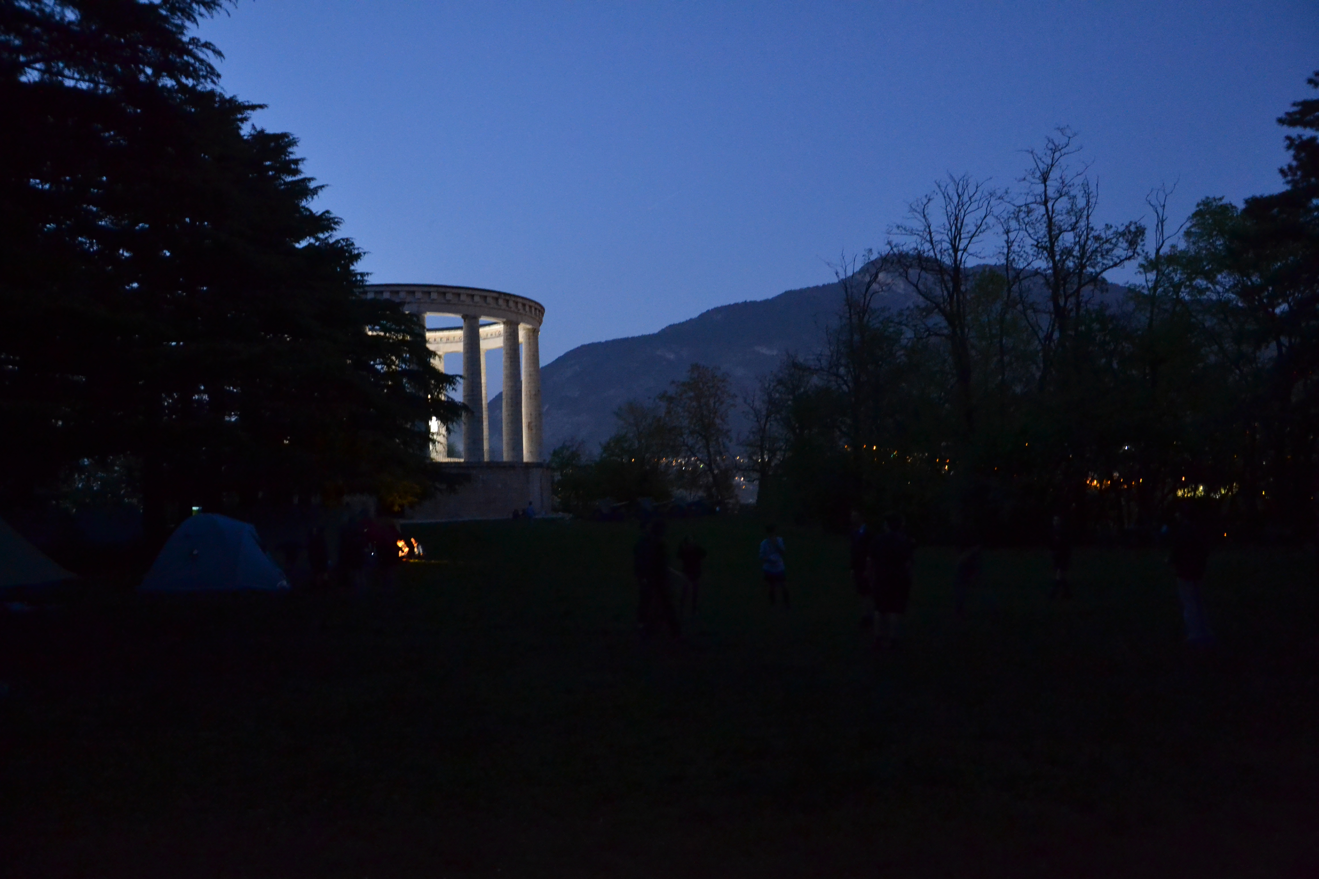 Doss Trento (Q49967101)